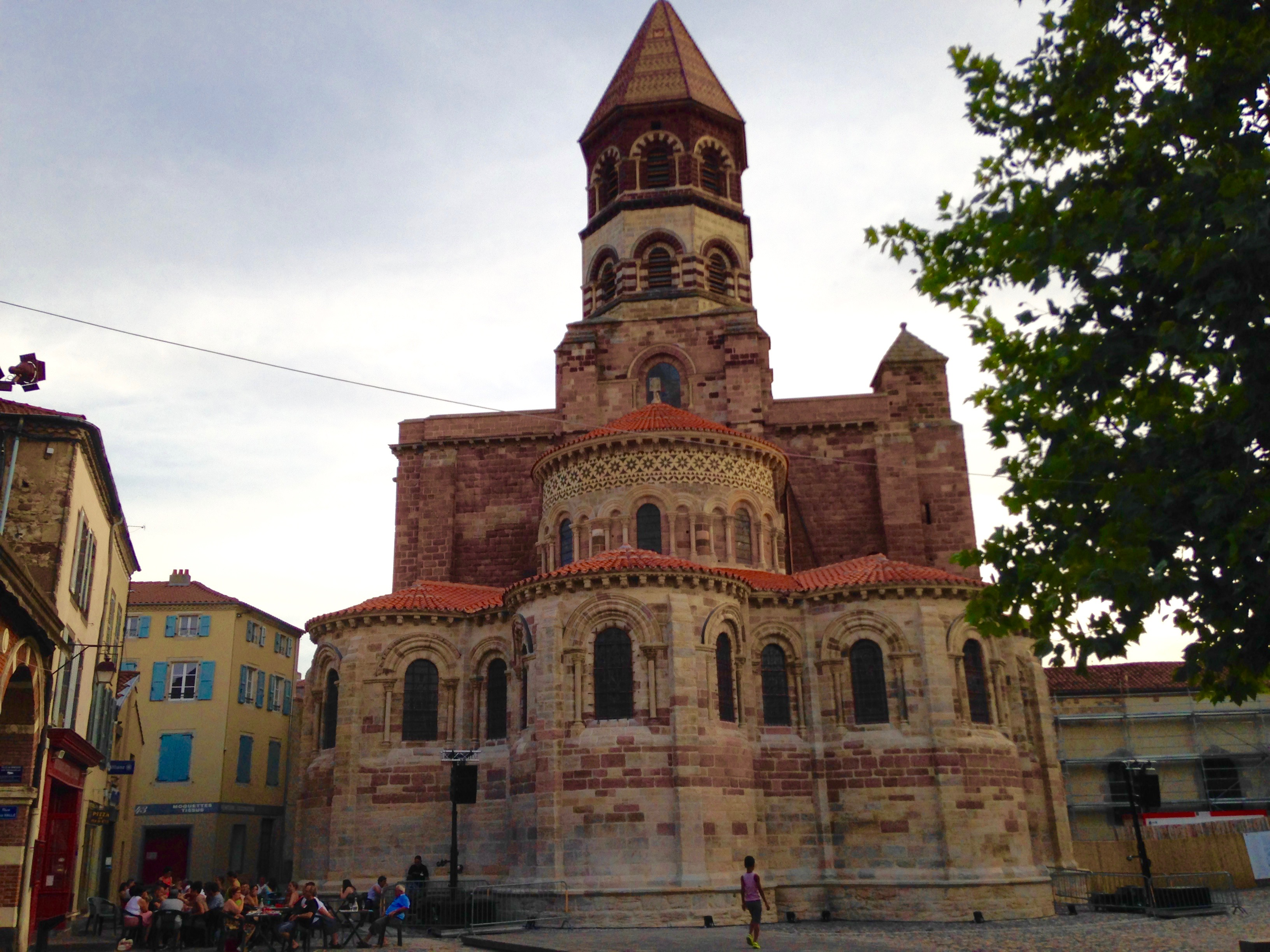 Restauration du chevet de Brioude